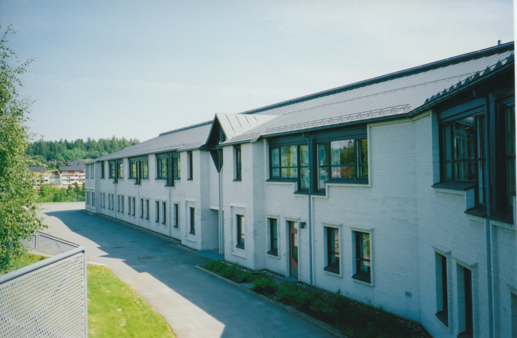 Format: Fotopositiv Dato / Date: 2003 Fotograf / Photographer: Byantikvaren Sted / Place: Enromvegen 6, Trondheim Wikipedia: Stavset Eier / Owner Institution: Trondheim byarkiv, The Municipal Archives of Trondheim Arkivreferanse / Archive reference: Byantikvaren - Skoler i Trondheim 2003 - A1.S1.BC129 Stavset skole, Enromvegen 6, barneskole (1.-7. trinn); 400 elever (2007). Skolen ble oppført og åpnet 1993 (ark. Dag Henning Braathen). Kilde: Terje Bratberg: Trondheim byleksikon (Oslo 2008) s. 499.